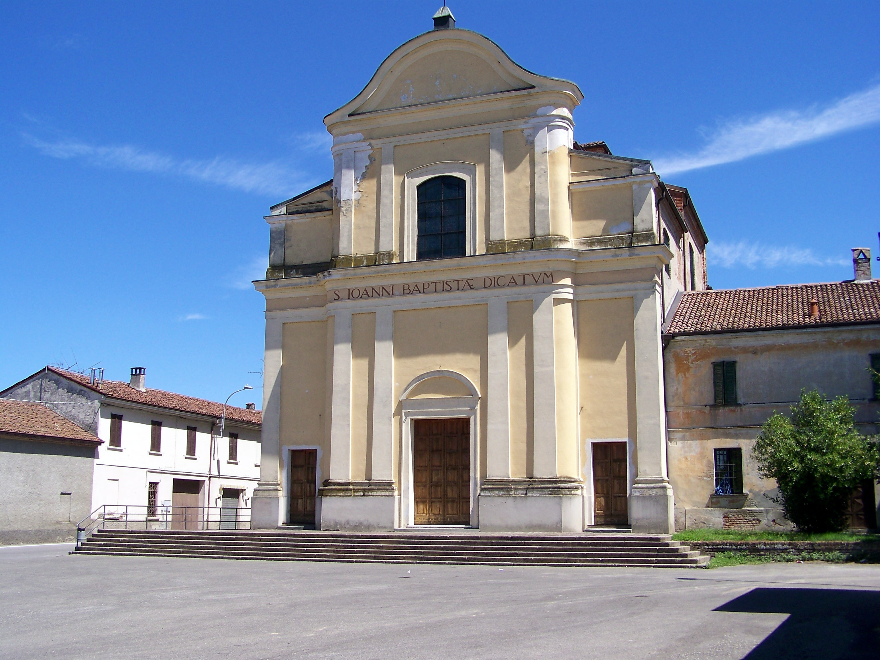 Fronte della Chiesa di San Giovanni Battista in Olmeneta.